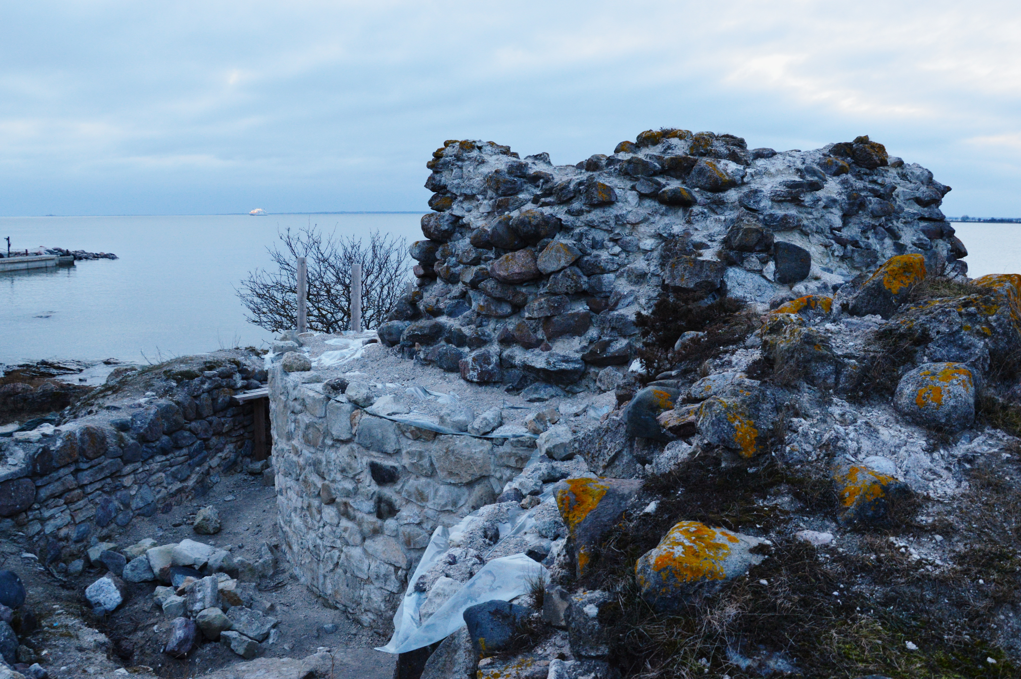 Virtsu vasallilinnuse varemed.